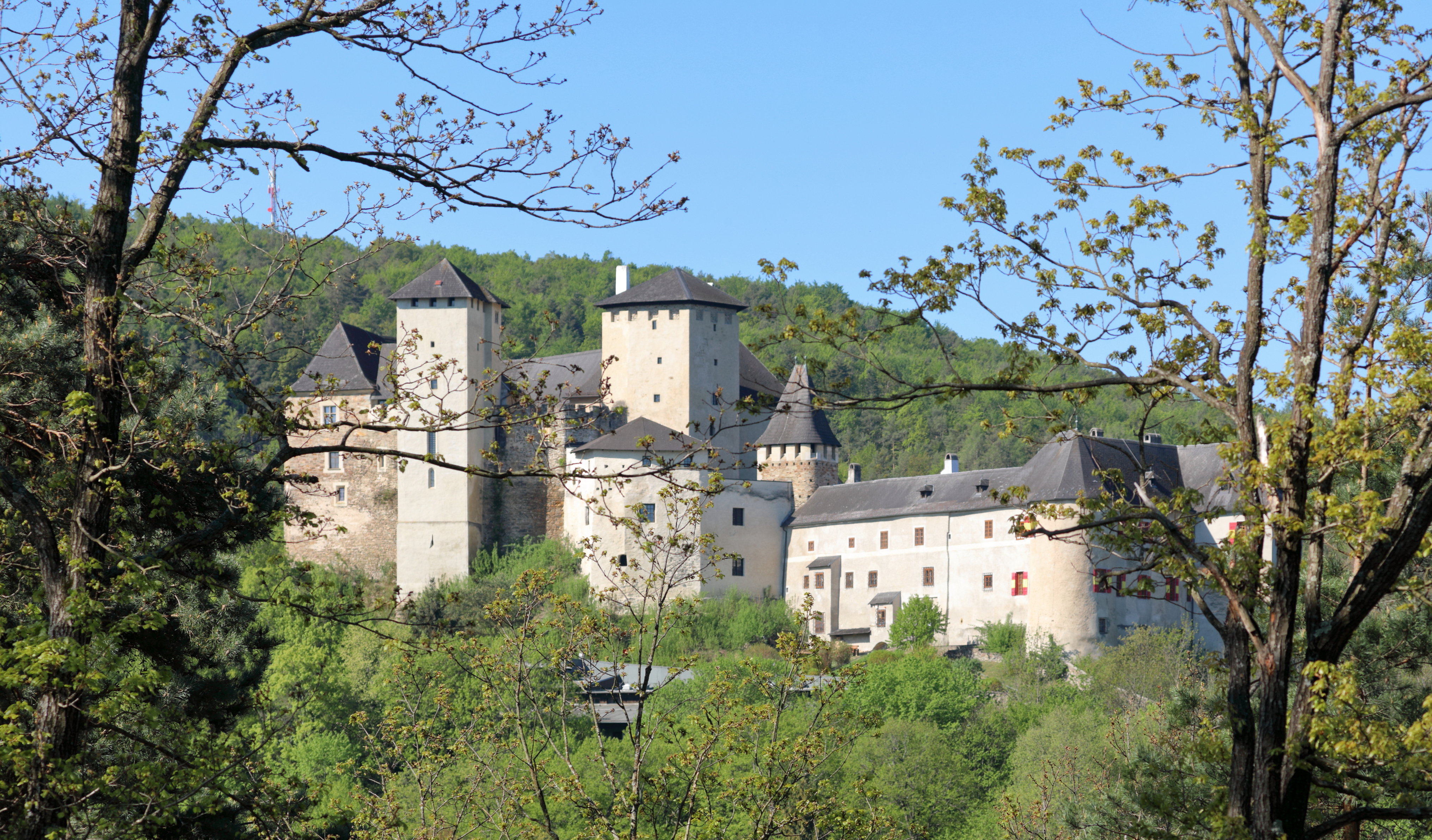 Nordostansicht der Burg in der burgenländischen Marktgemeinde Lockenhaus.